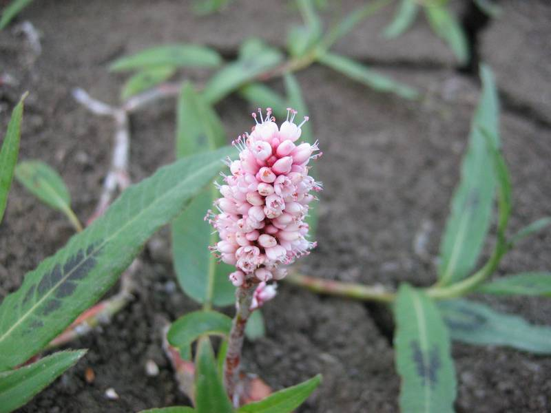 Wasser-Knöterich Persicaria amphibia